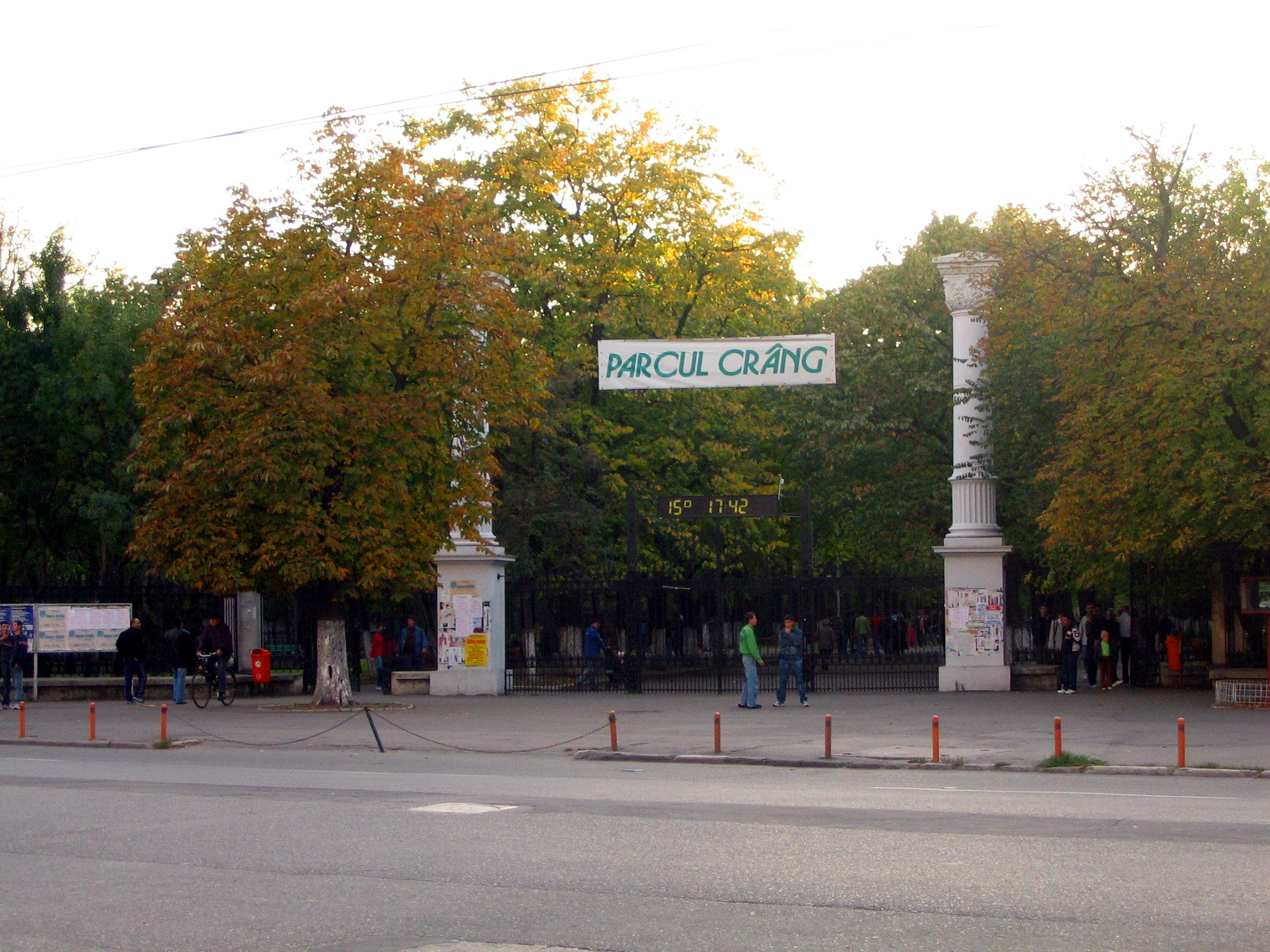 Main entrance to the Crâng park, Buzău, Romania